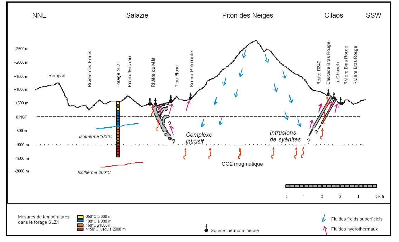 Modèle conceptuel du système géothermique proposé, au droit des cirques de Salazie et de Cilaos (d’après BRGM, 2001)